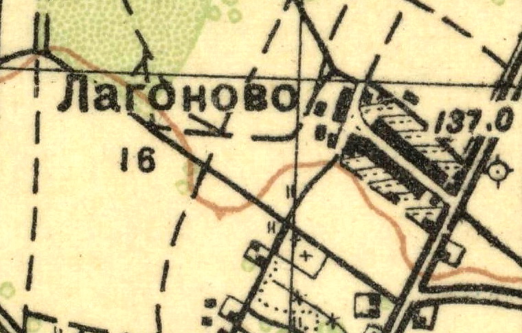 Топографическая карта Ленинградской области, квадрат О-35-23-Г (Волосово), деревня Лагоново